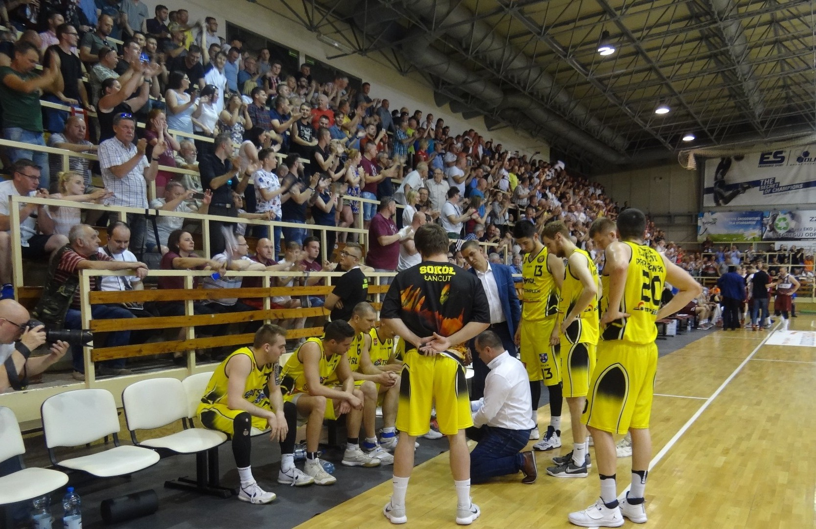 Finał. Sokół Łańcut w meczu ze Spójnią Stargard (13.05.2018)